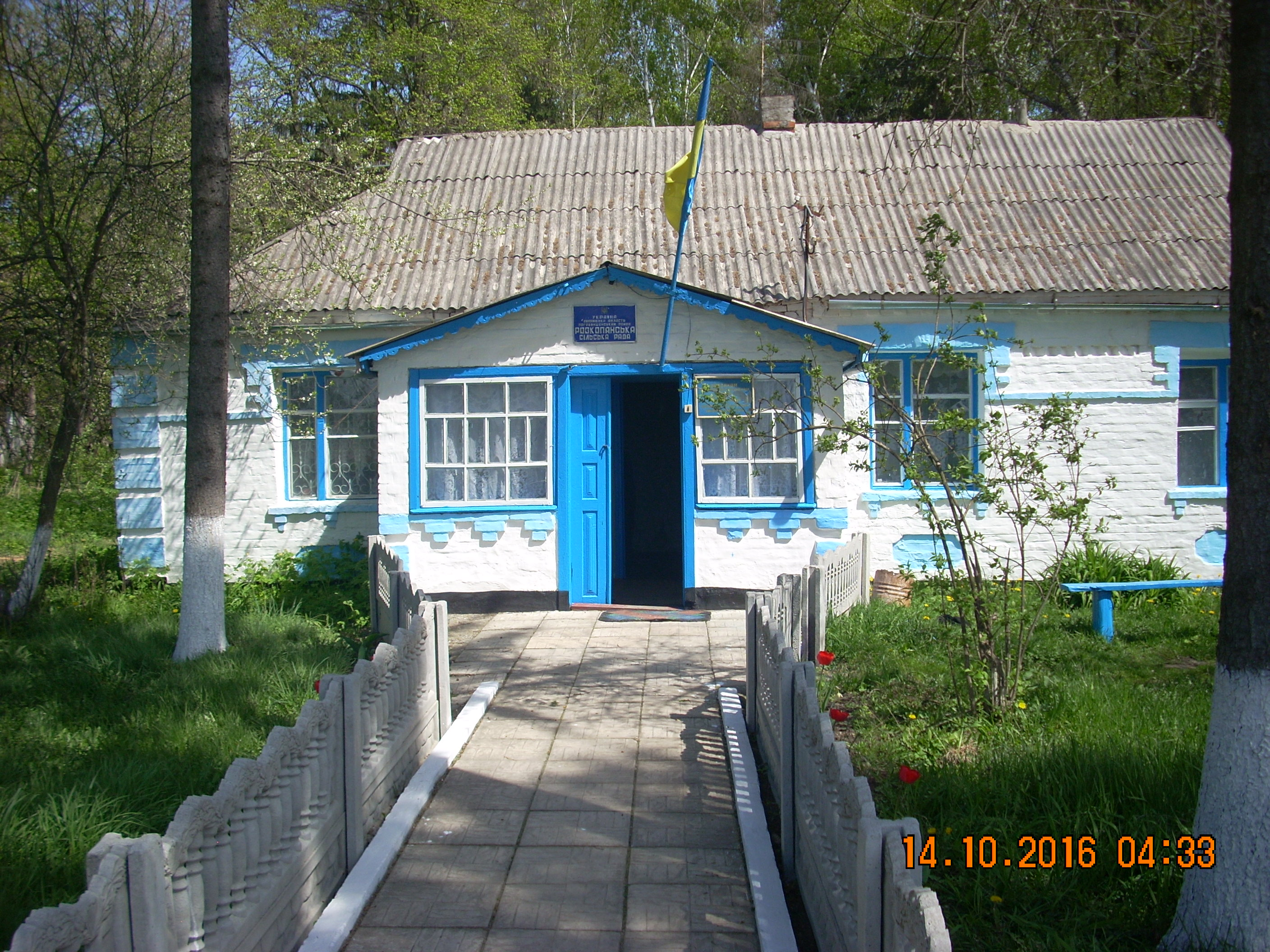 Розкопанська сільська рада